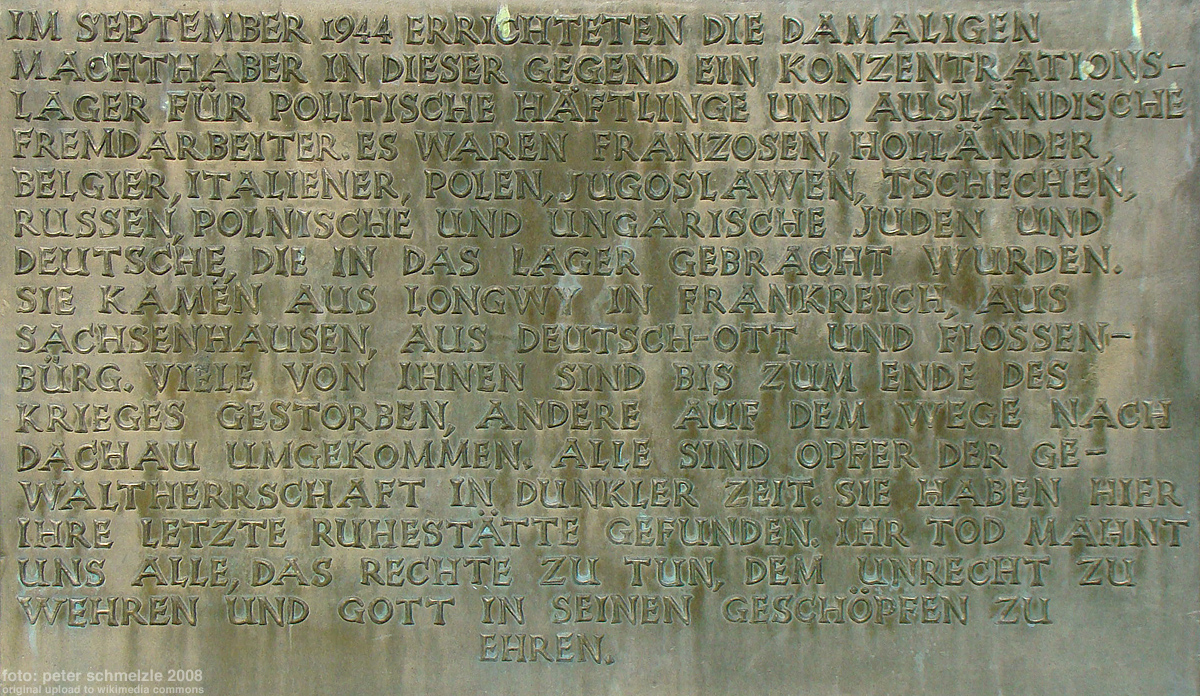 Gedenktafel am Friedhof des KZ Kochendorf auf dem Gebiet des benachbarten Neckarsulm-Amorbach.